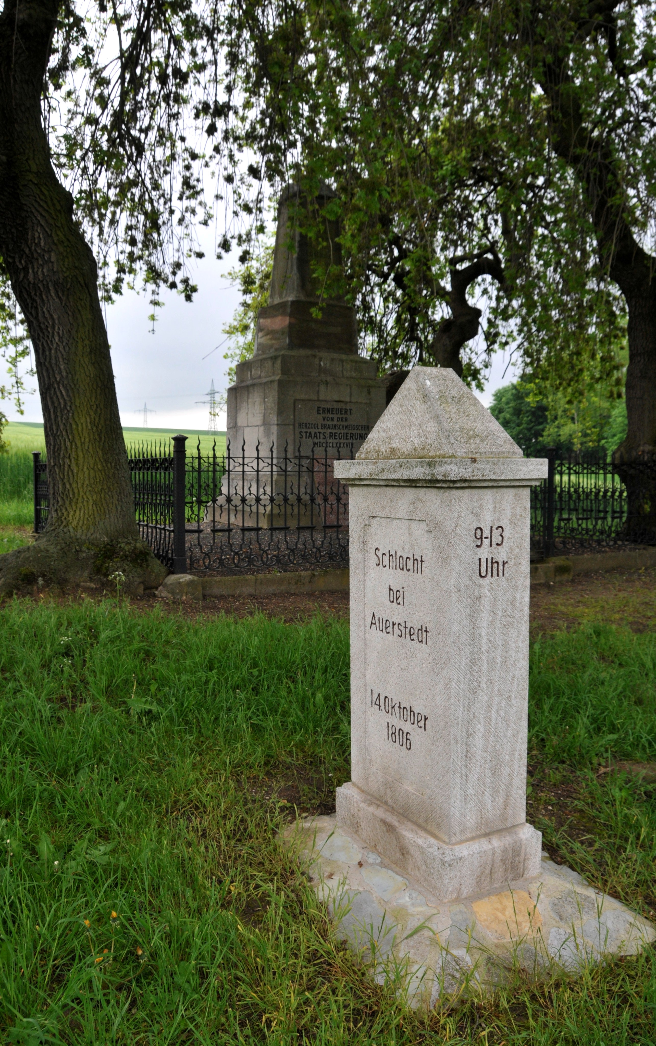 Bad Kösen-Hassenhausen, Denkmal Karl Wilhelm Ferdinand von BS